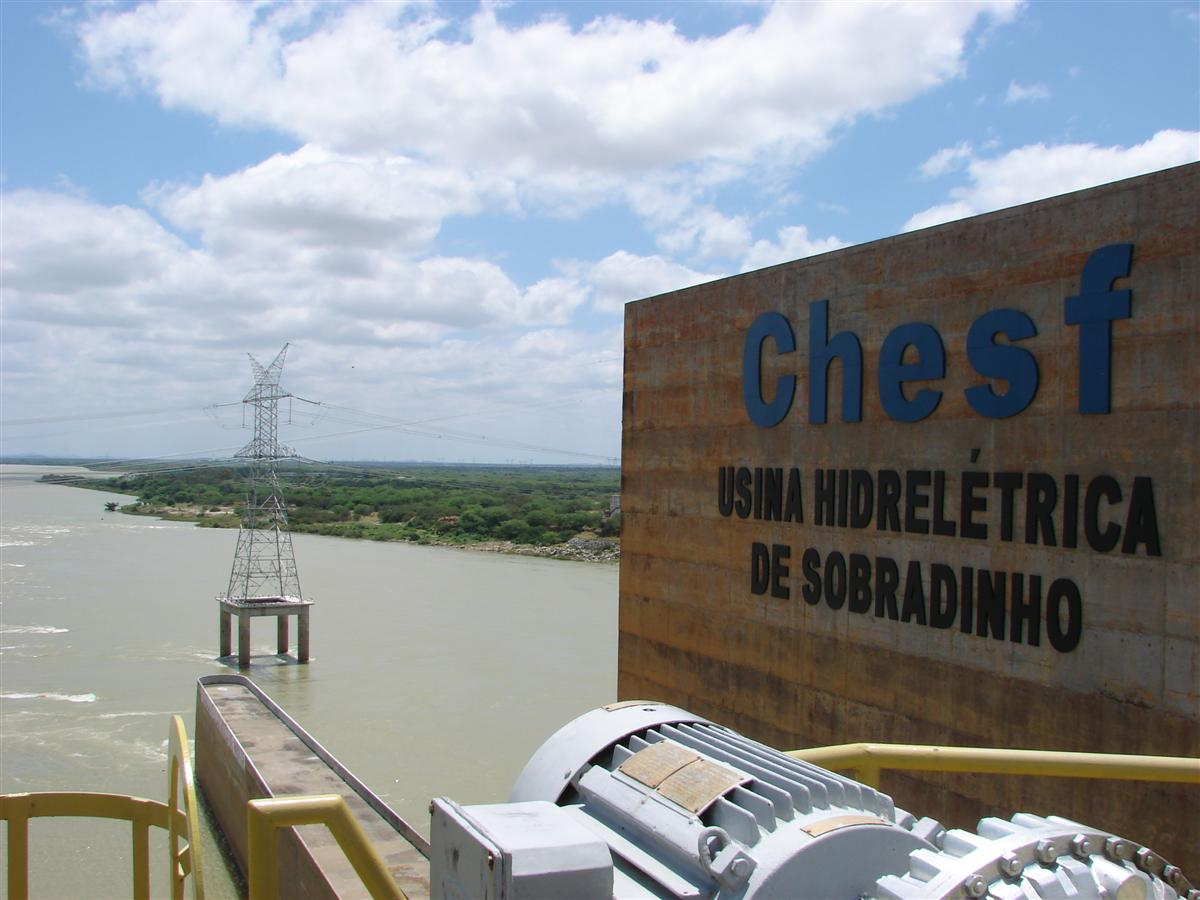 Usina Hidrelétrica de Sobradinho, Bahia, Brasil.